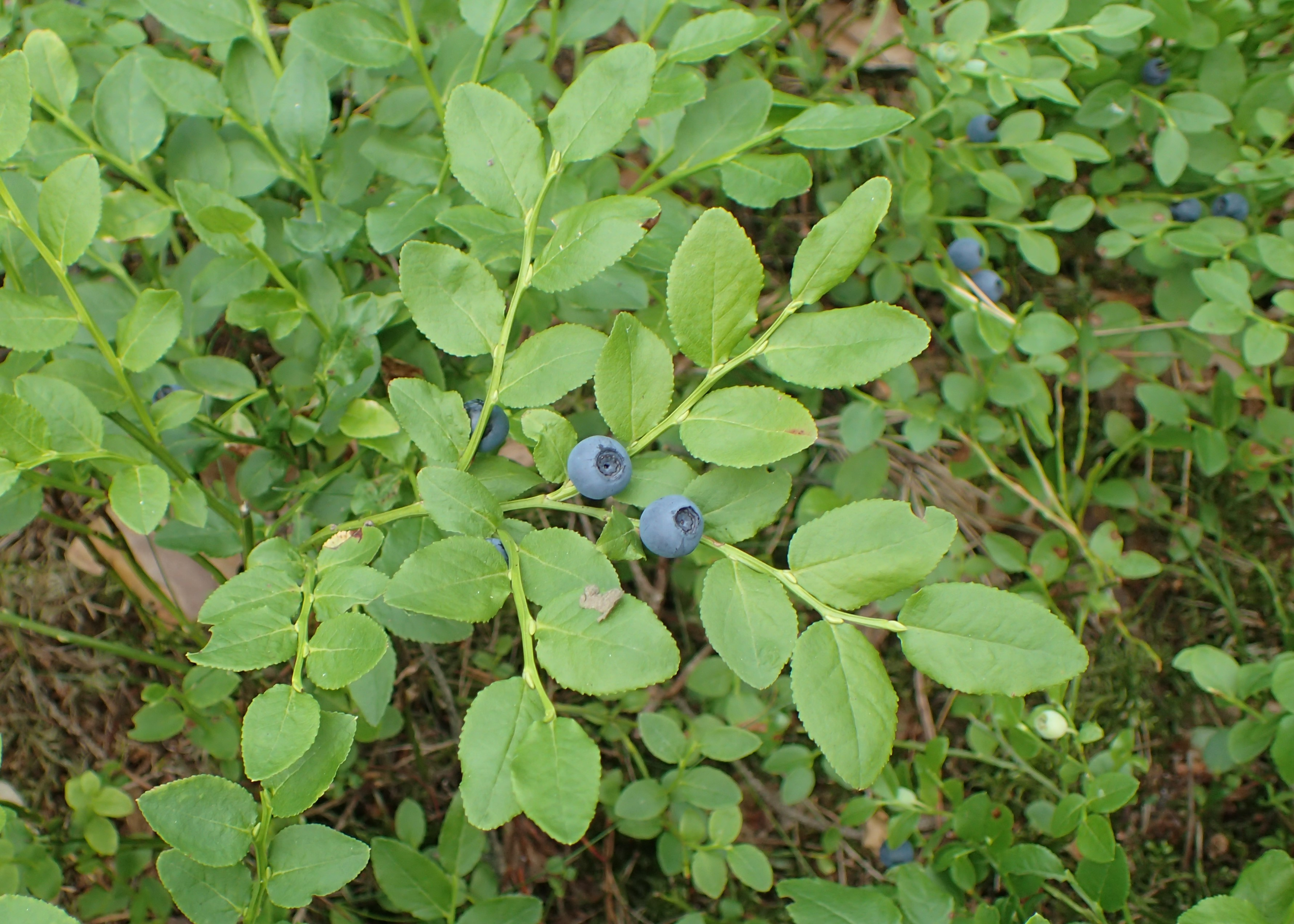 Vaccinium myrtillus in Przybiernów, NW Poland